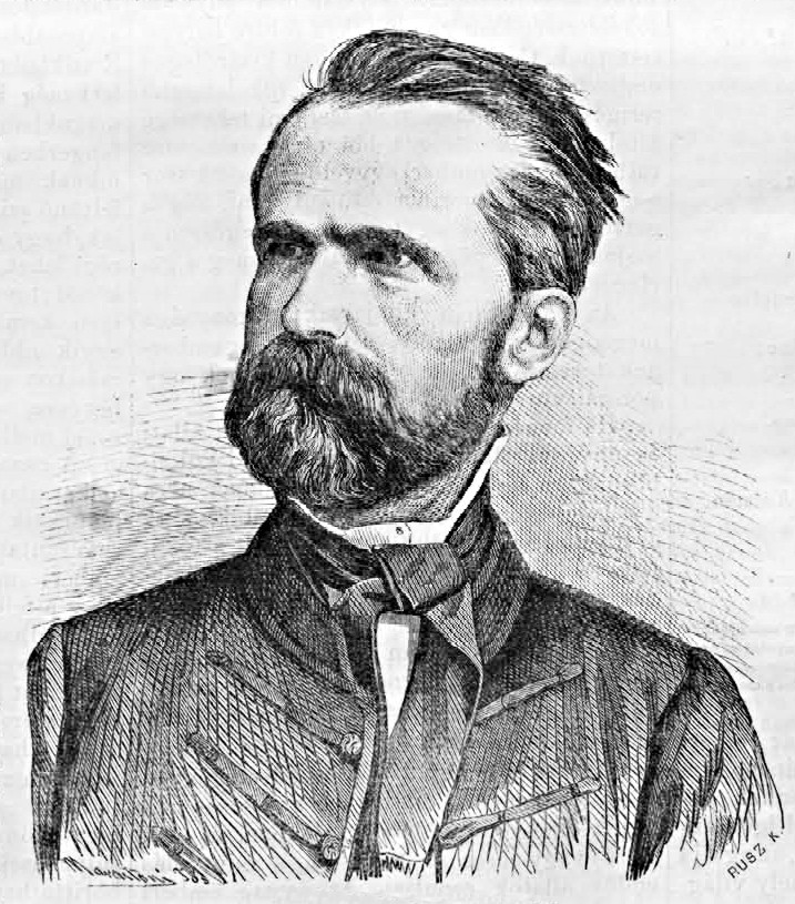 Weber Henrik (1818–1866) festőművész portréja. Rusz Károly metszete Marastoni József rajza alapján